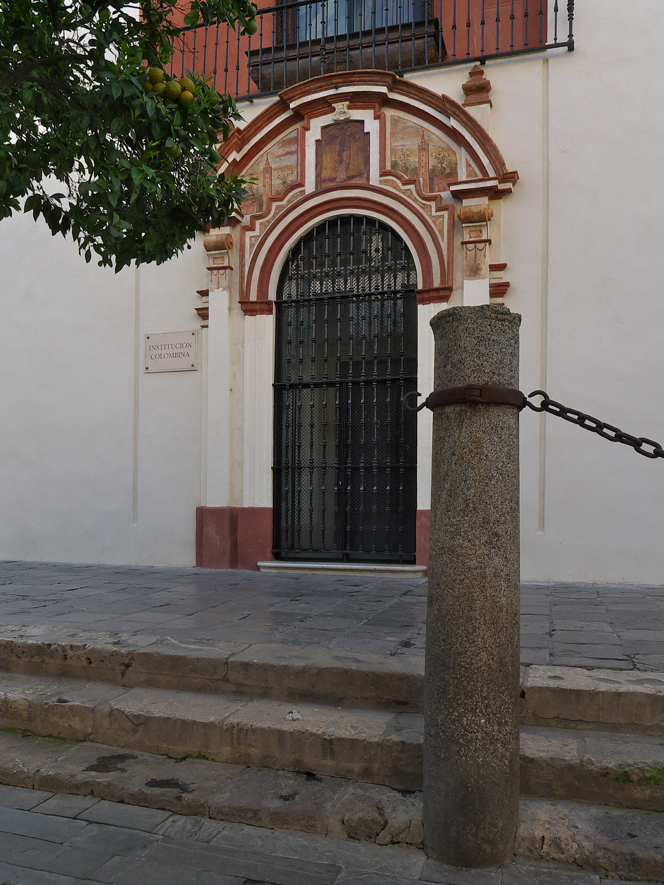 Entrada a la Institución Colombina.